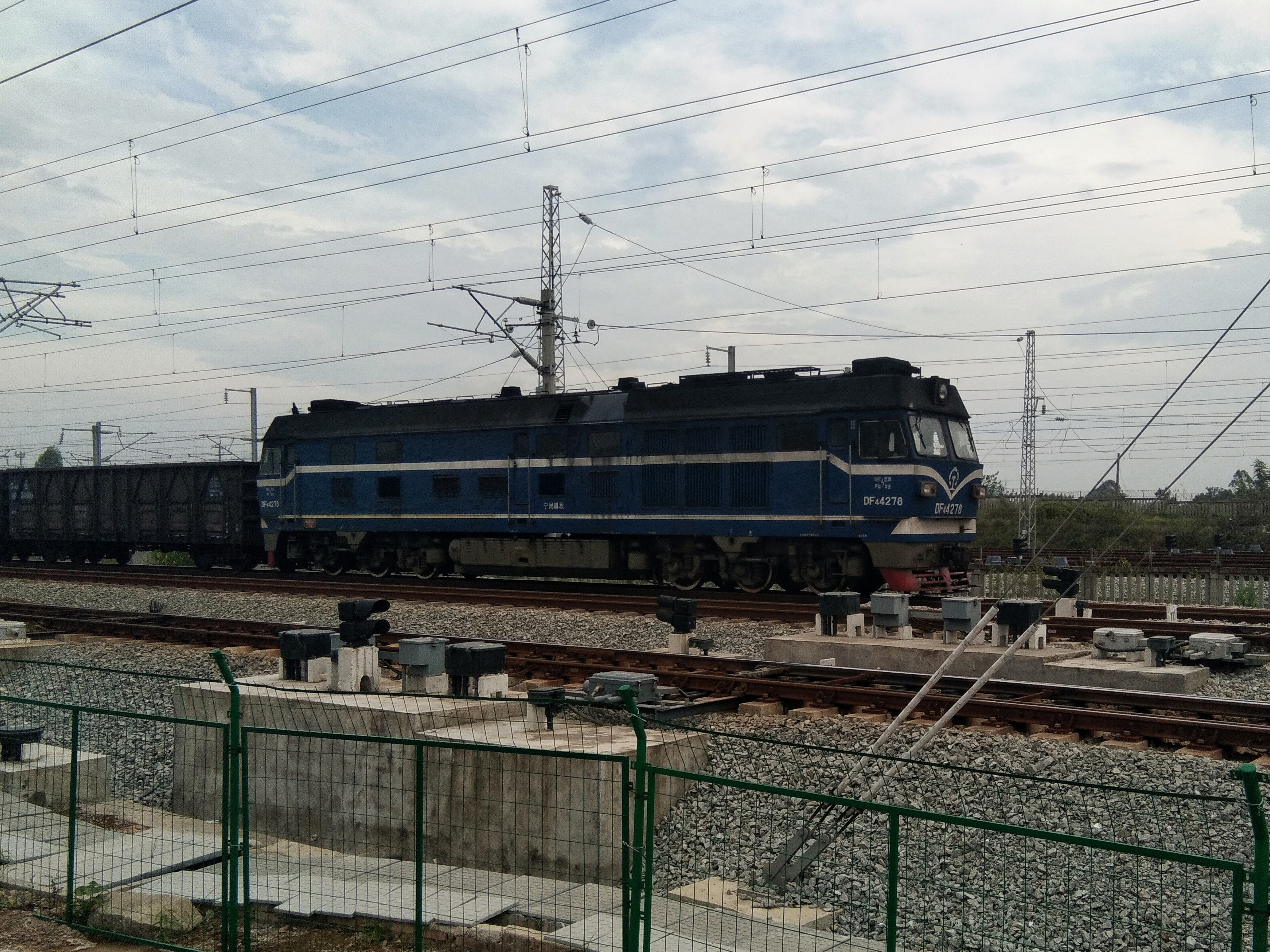 4278号东风4C型内燃机车牵引货列驶入桂林西站湘桂场